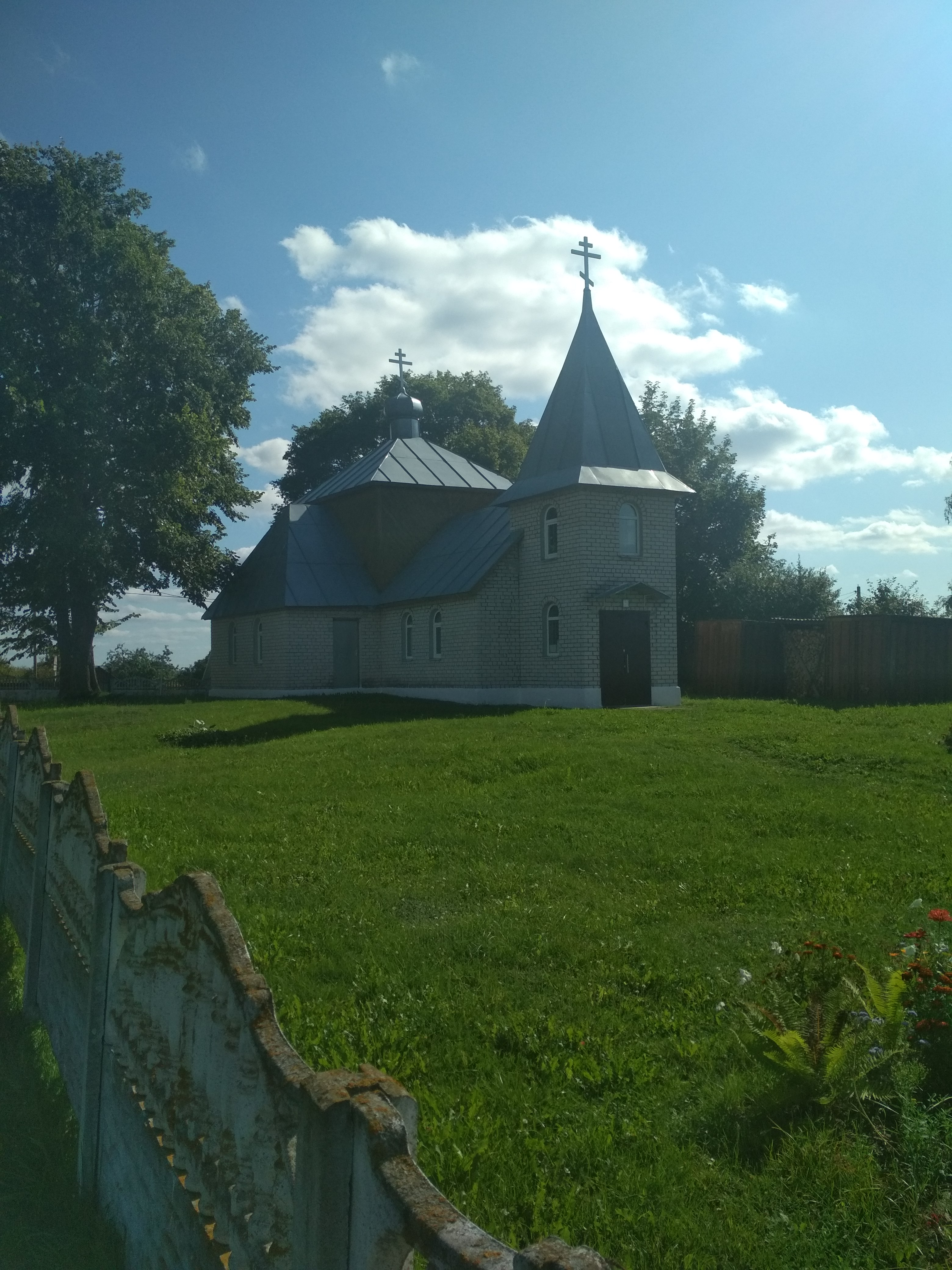 Сяргеевічы. Свята-Раства-Багародзіцкая царква